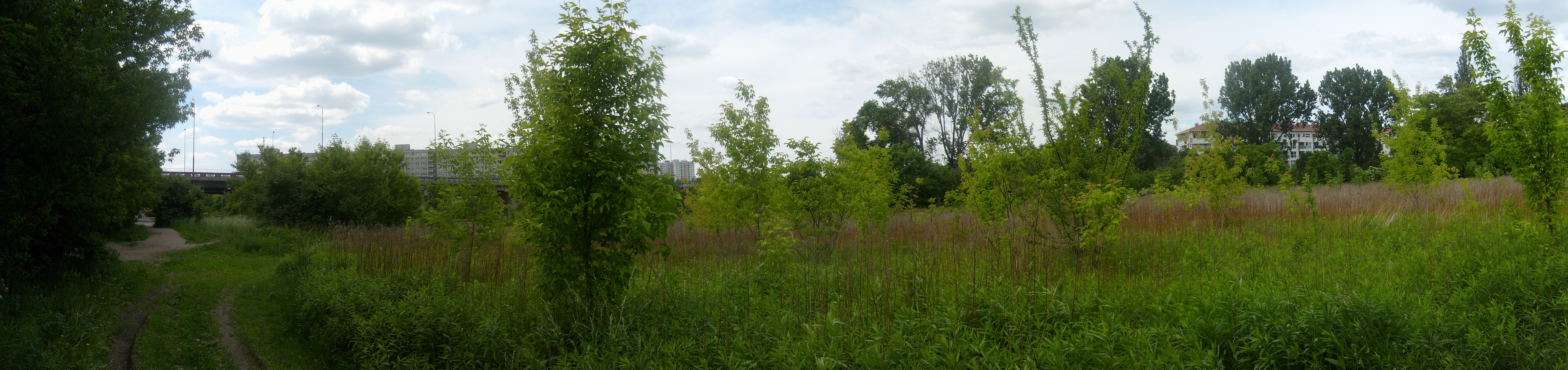 Dolina Obrzycy